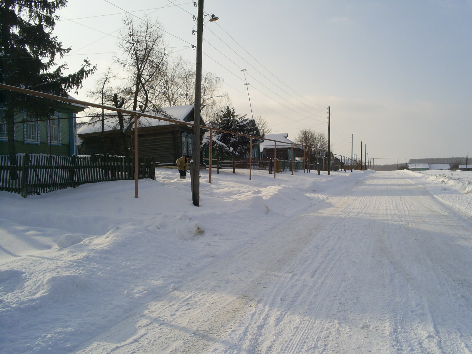 Вид главной улицы села Ожгибовка (Пильнинский район Нижегородской области, Россия).